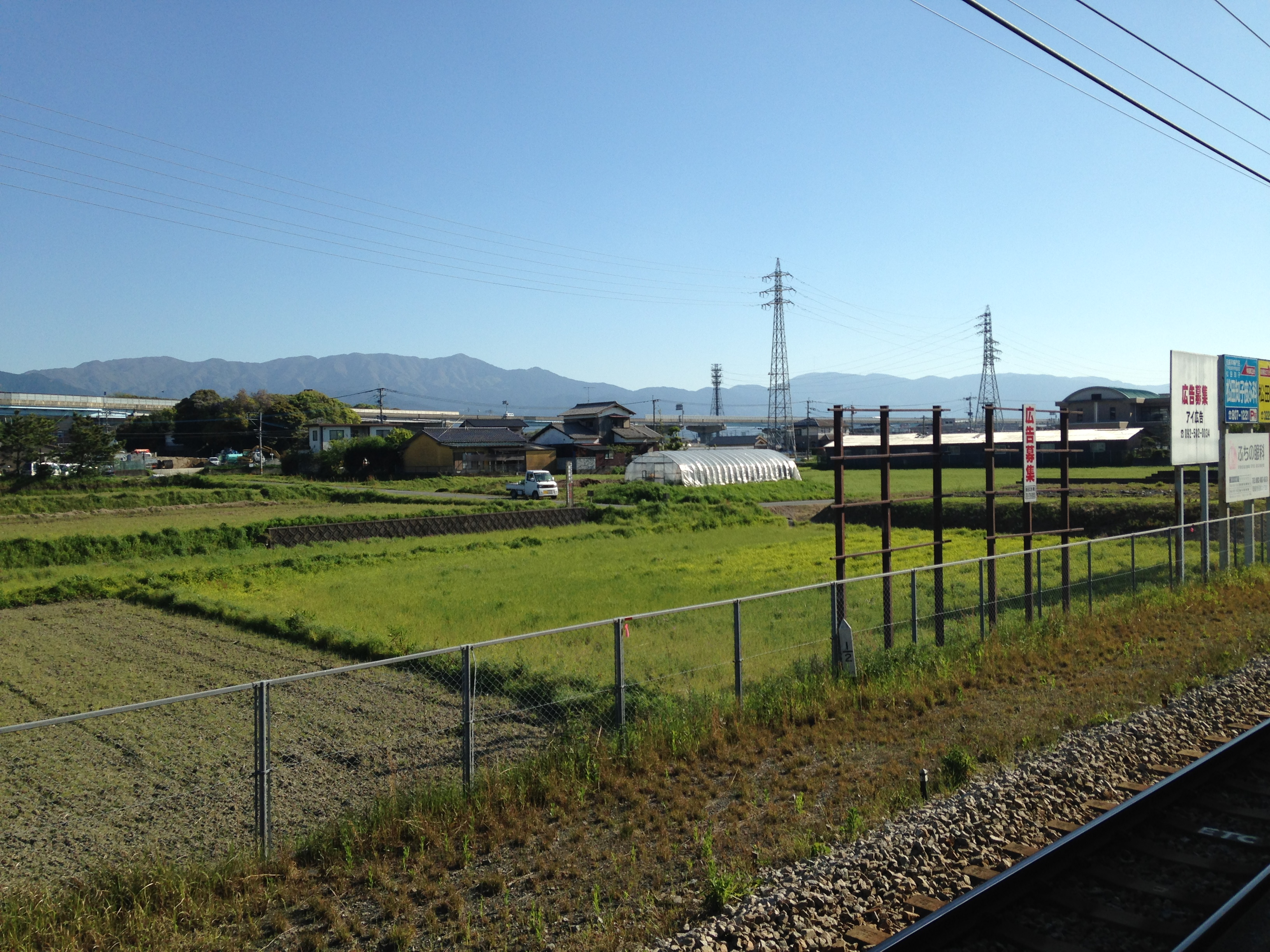 周船寺駅のホームより望む雷山